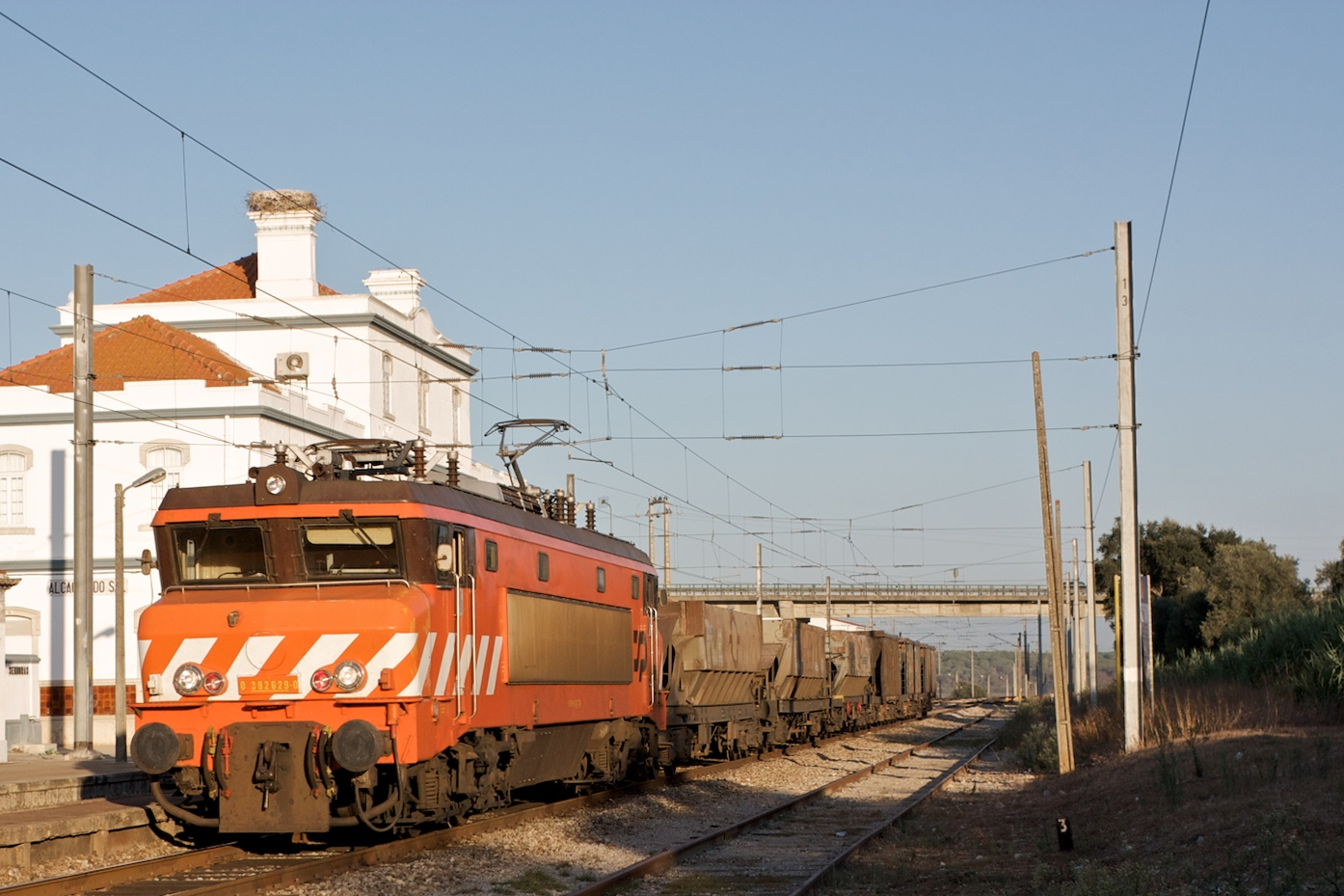 Tipo: Comboio de Transporte de Areia 62997 [Entroncamento - Loulé] Local: Estação de Alcácer do Sal [Linha do Sul, PK 78] Data e hora: 24 de Setembro de 2009 [08h11] Material: Locomotiva 2629 + 6 vagões (3 Tranfesa Faoos e 3 CP Falls)